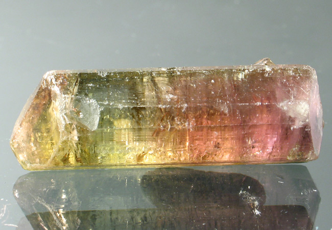 minerał:turmalin elbait, pochodzenie Madagaskar; autor zdjęcia Stowarzyszenie Spirifer 10.07.2006r.